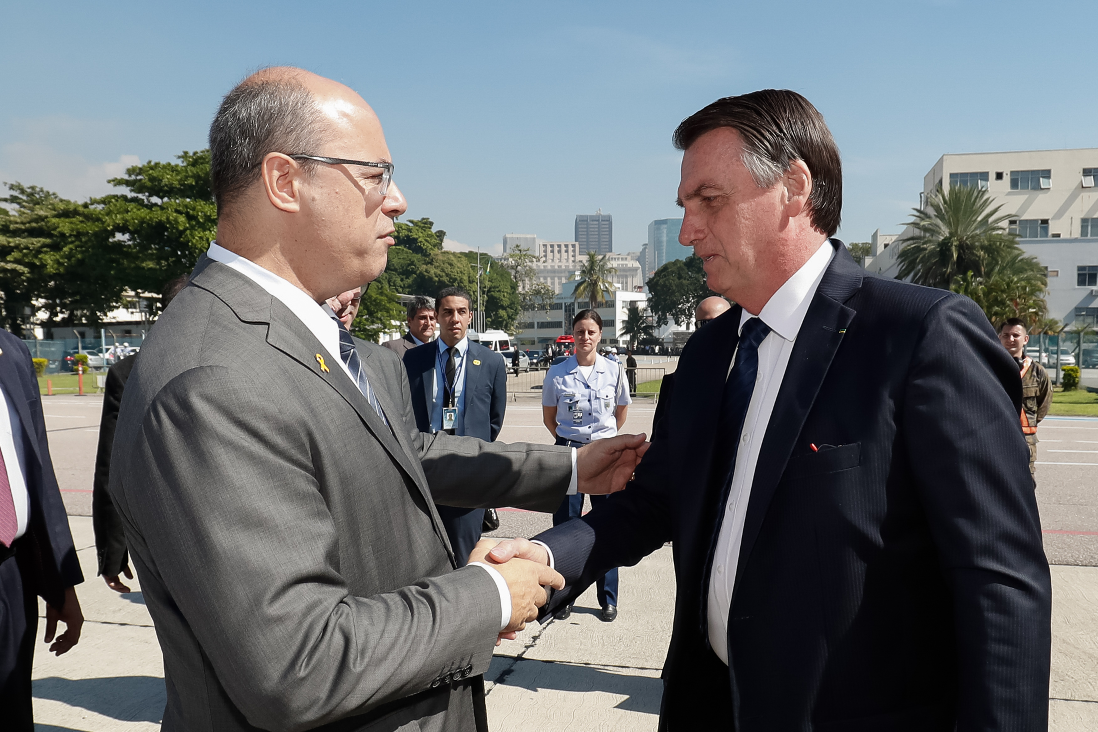 (Rio de Janeiro - RJ, 20/05/2019) Presidente da República, Jair Bolsonaro recebe os cumprimentos do Governador do Estado do Rio de Janeiro, Wilson Witzel. Foto: Alan Santos/PR